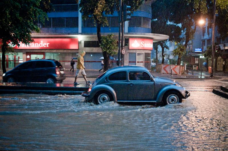 Strato en Rio-de-Ĵanejro dum la inundo en 2010.